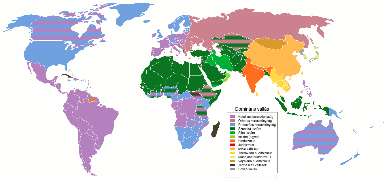 A világ vallásai területi elhelyezkedés (államhatárok) szerint. Egy-egy területen a domináns vallás(ok) van(nak) jelölve